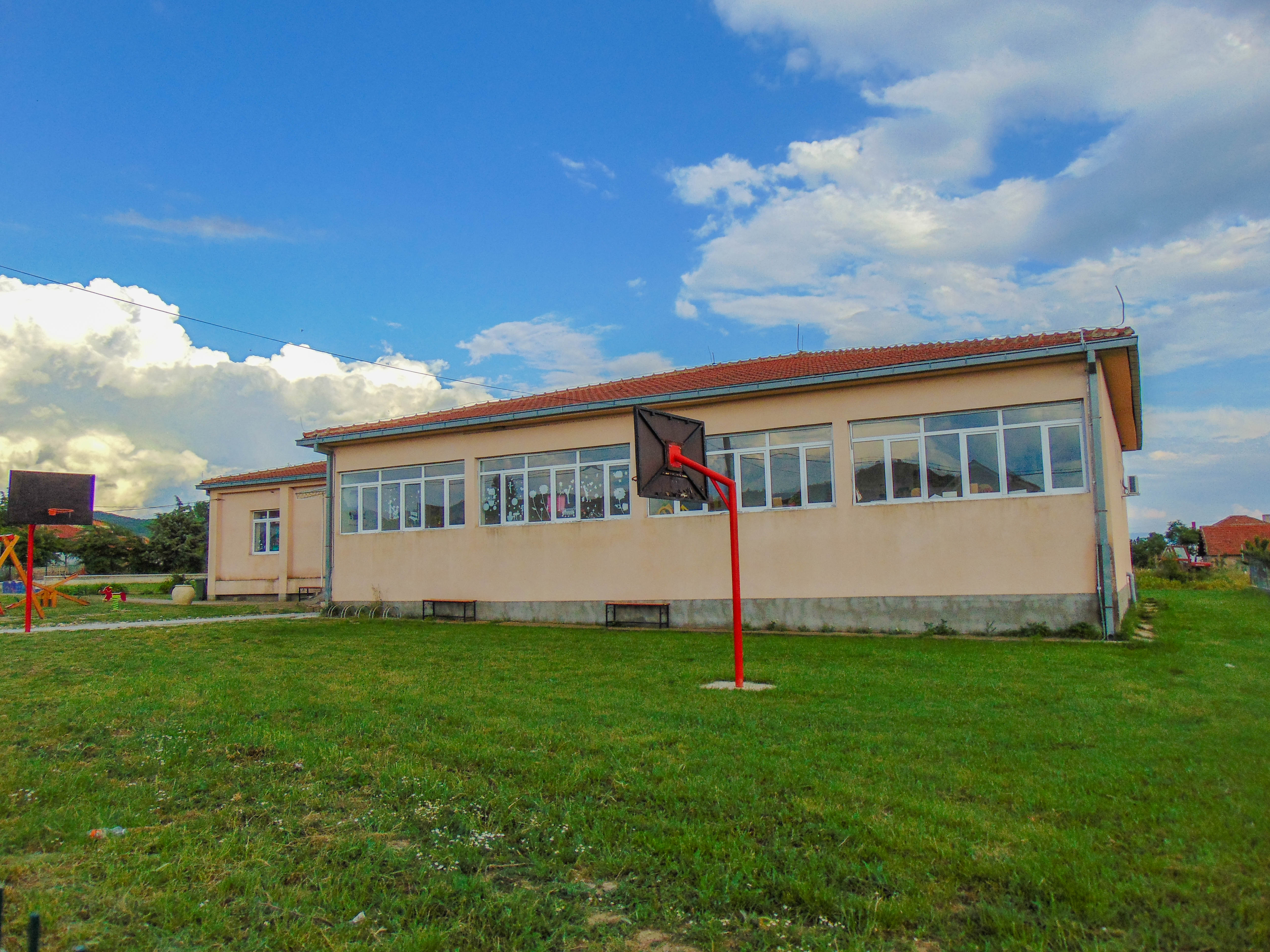 ОУ „Коста Рацин“ - Јаргулица